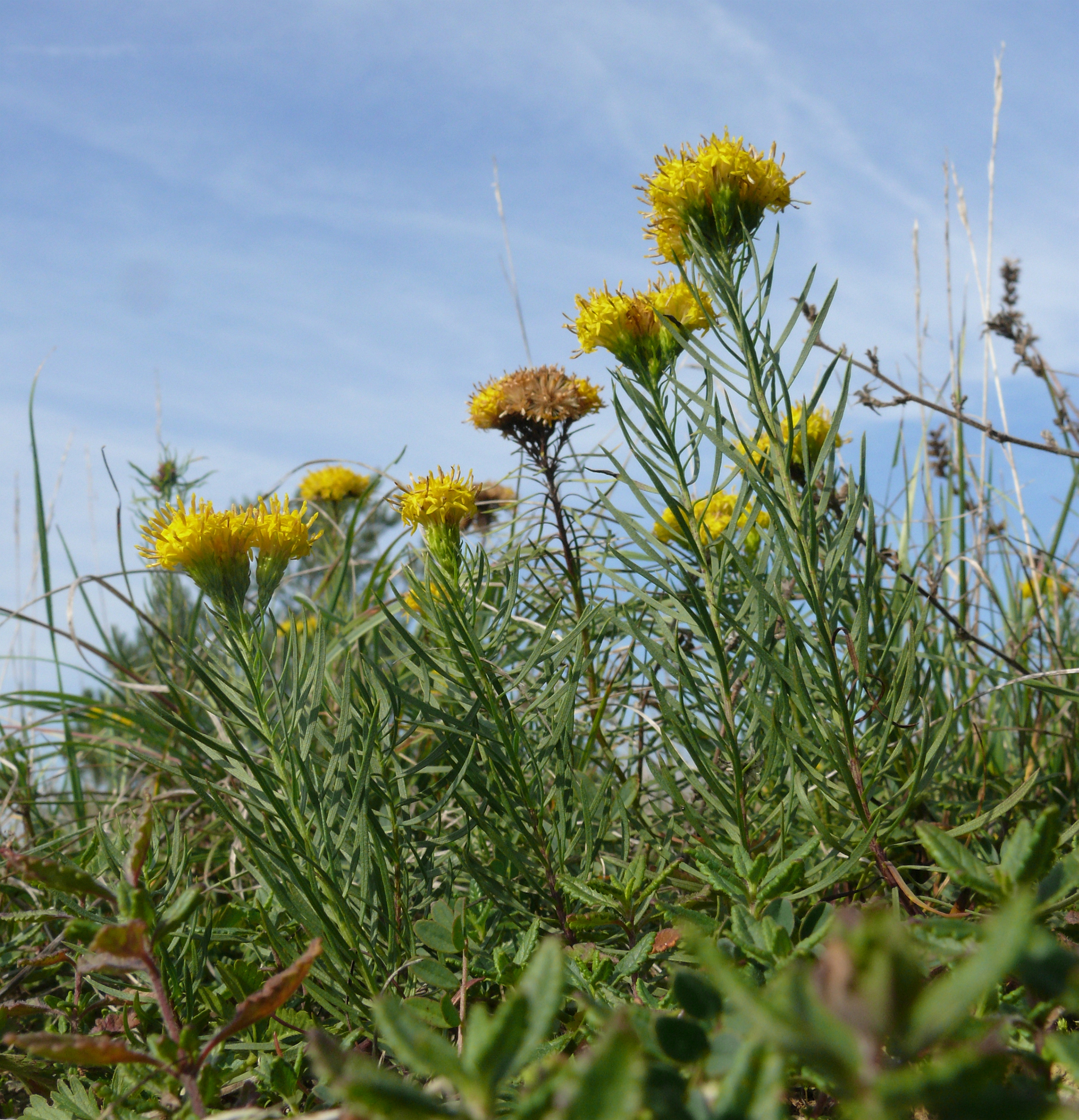 Crinitaria linosyris, Tauberland, Deutschland